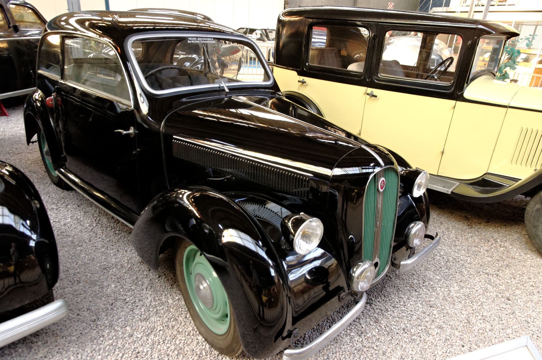 La Licorne 163 (1939), Berline 2 portes, 4 cyl. en ligne, 1628 cm3, 36 ch., vitesse max. 110 km/h (Musée Automobile Reims Champagne, Reims, Marne, France)